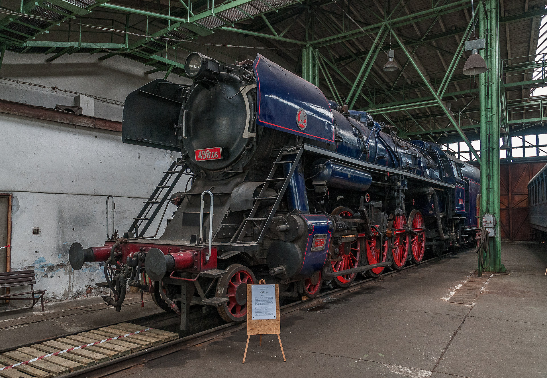 Rekordní lokomotiva 498.106 v depozitáři Národního technického muzea v Chomutově